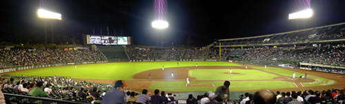 神戸総合運動公園野球場（Yahoo!BB STADIUM） 2003年09月26日撮影